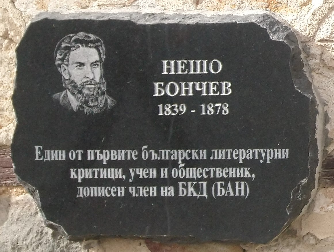 Нешо Бончев (1839 - 1878) - плоча в Исторически музей Панагюрище - Надпис: Един от първите български литературни критици, учен и общественик, дописен член на БКД (БАН).